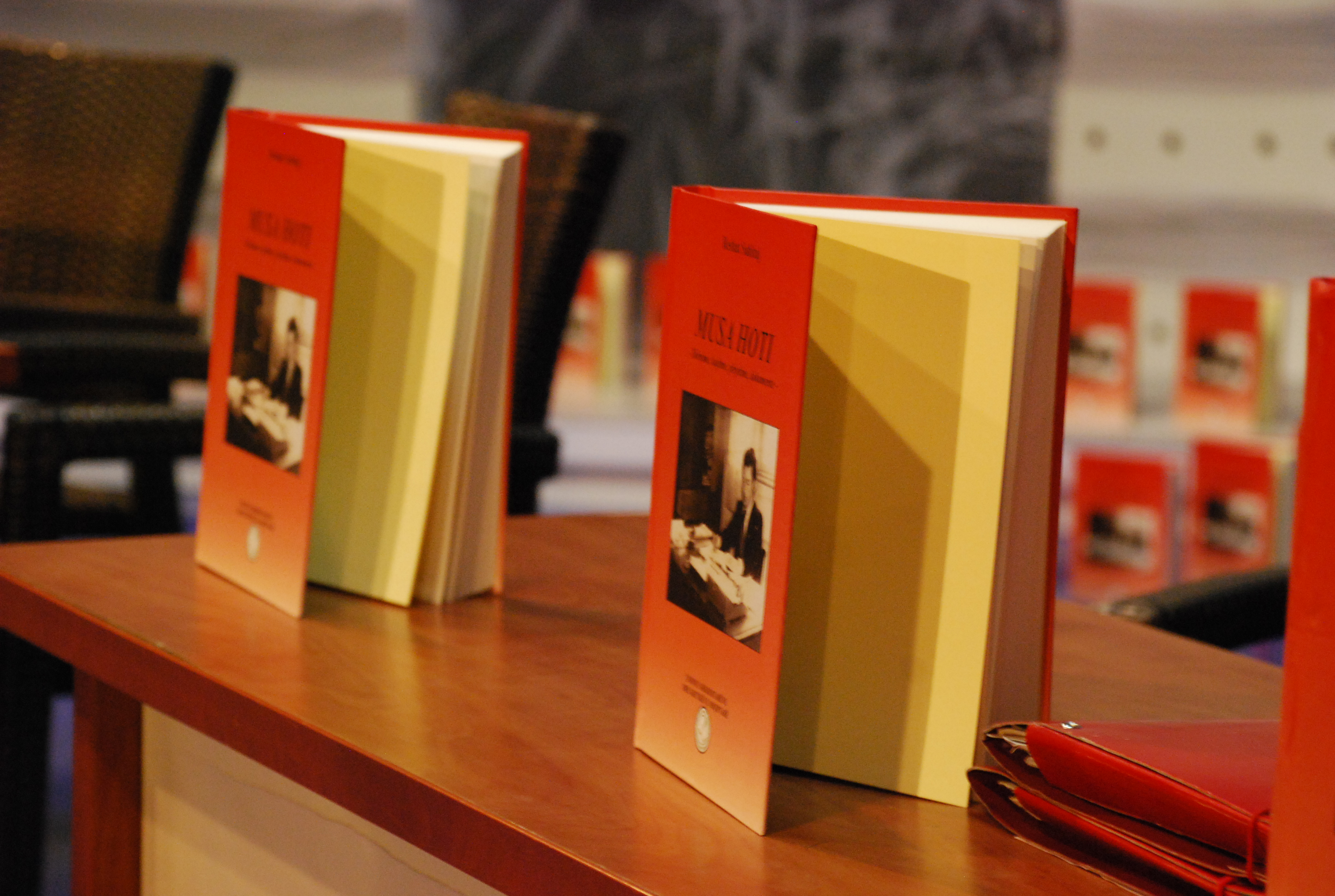 Biblioteka Kombëtare dhe Universitare e Kosovës.